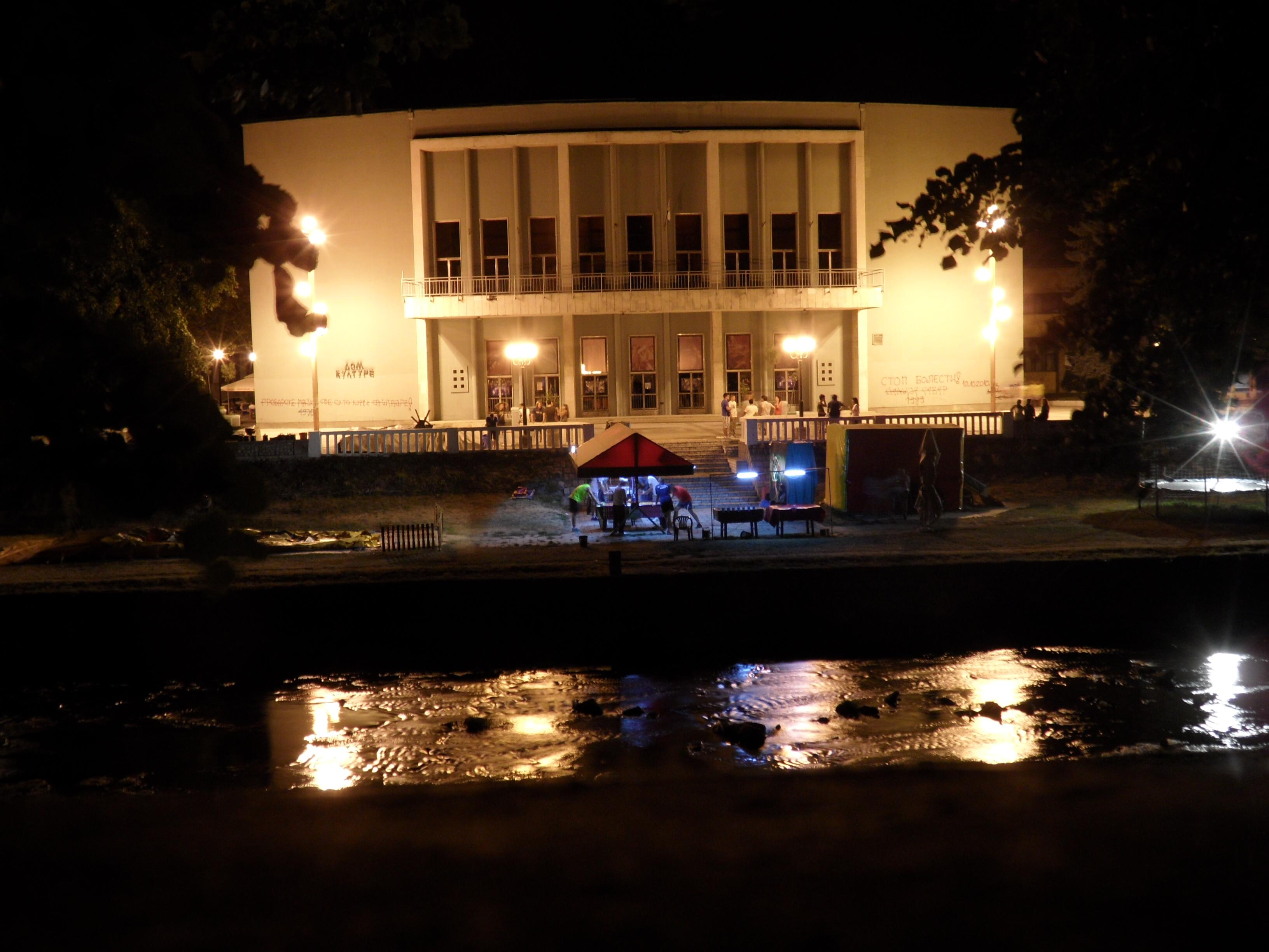 Zgrada Doma kulture u Valjevu